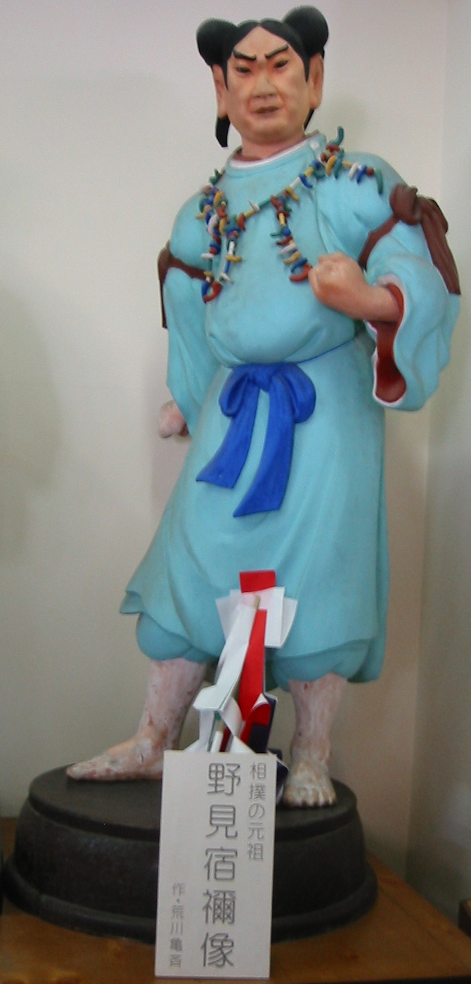 野見宿禰 (荒川 亀斎(きさい).作/1827- 1906)古代出雲大社模型展示館「雲太」(うんた)にて